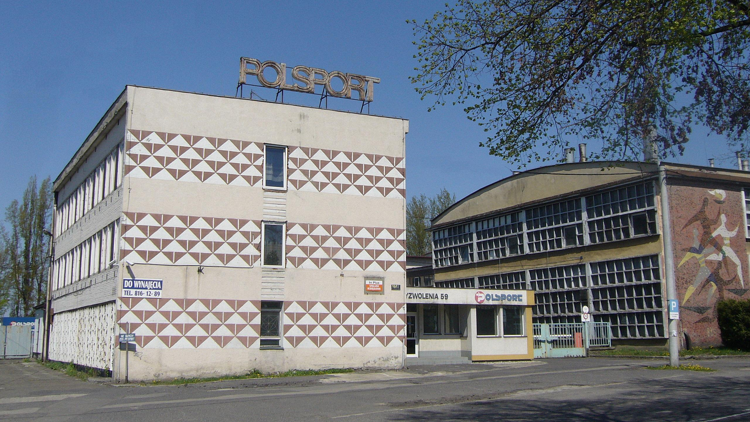 Południowe Zakłady Przemysłu Sportowego "Polsport" w Bielsku-Białej.